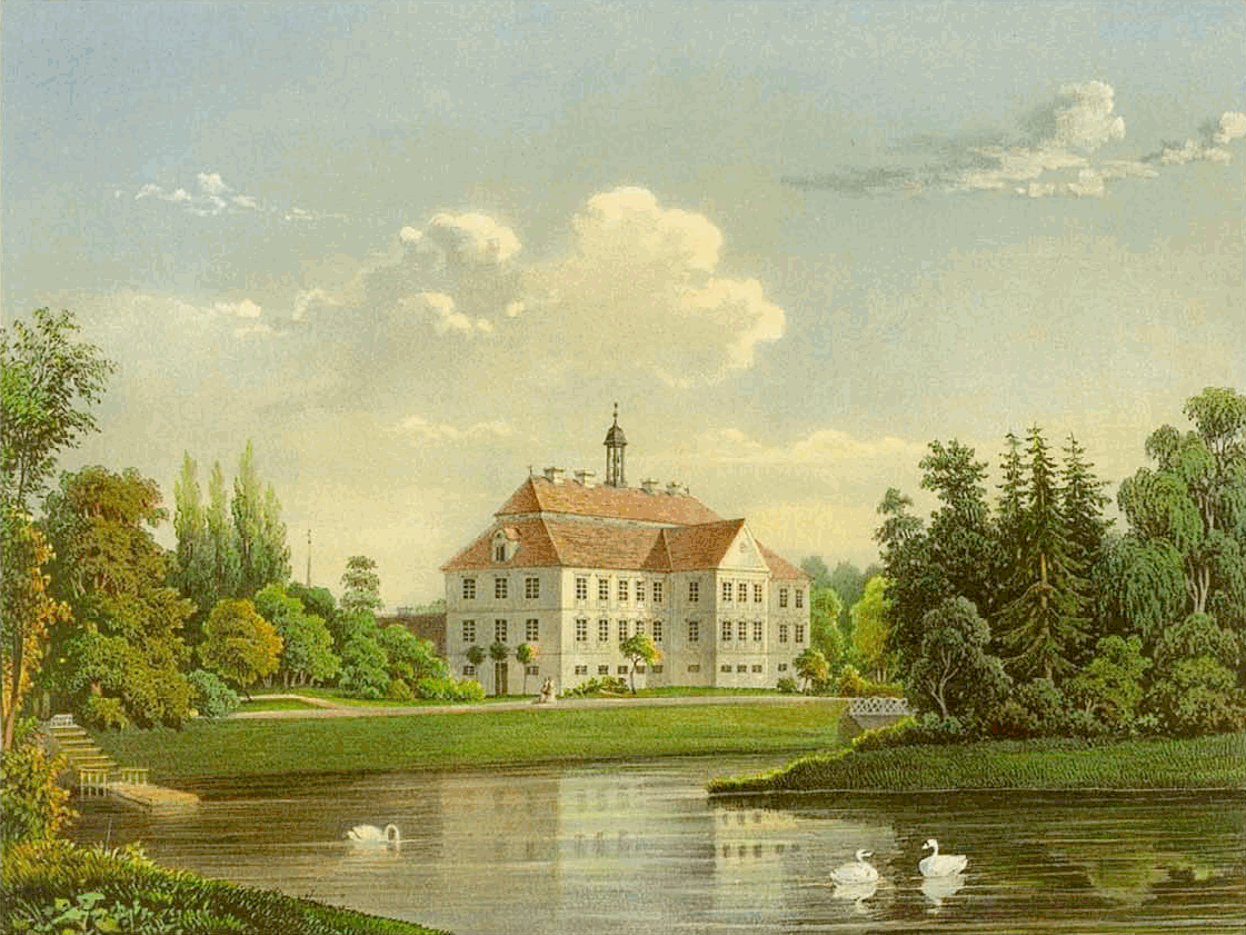 Schloss Griebenow bei Greifswald, Kreis Grimmen, Provinz Pommern